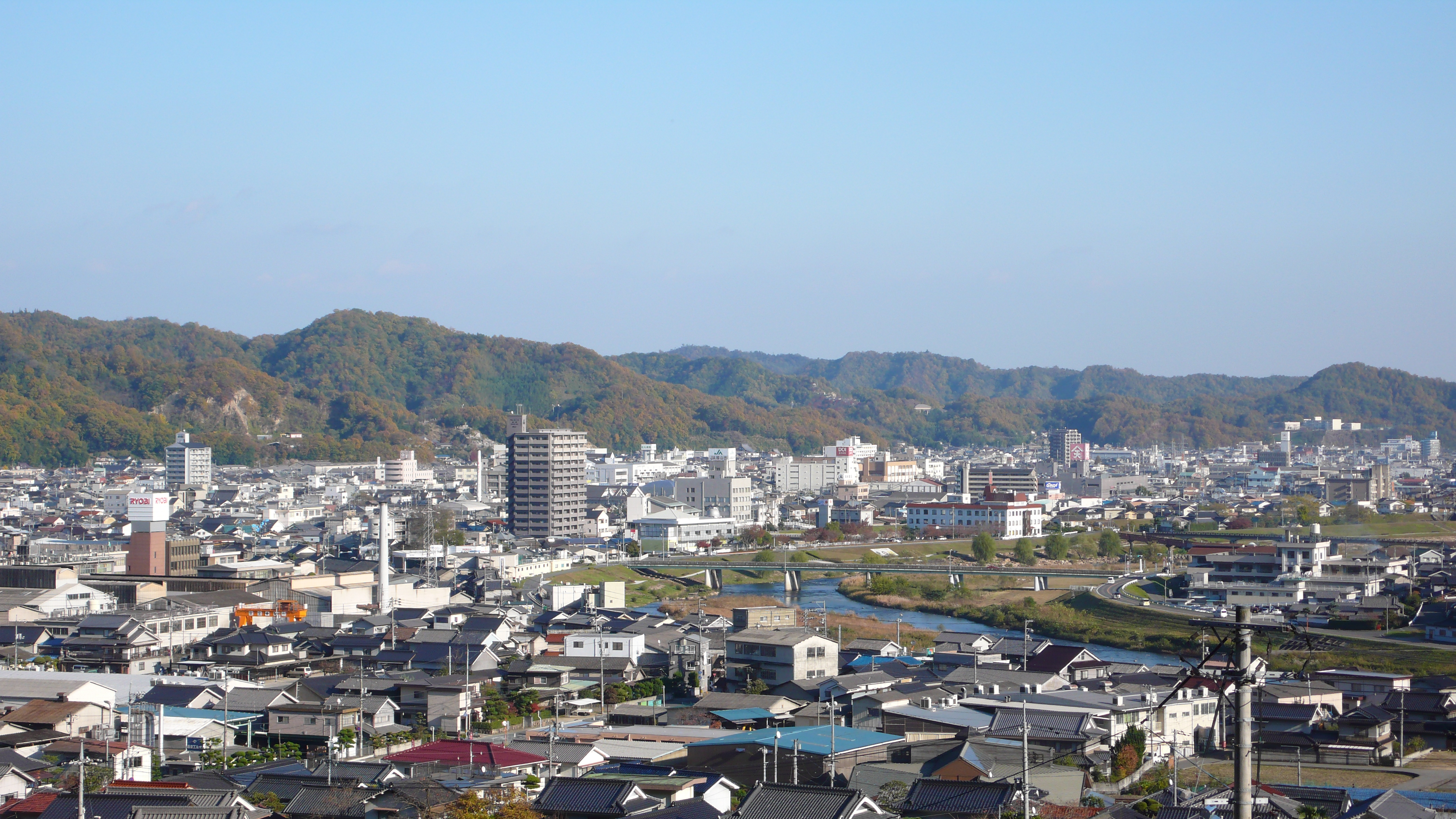 府中市街地（安楽寺より）